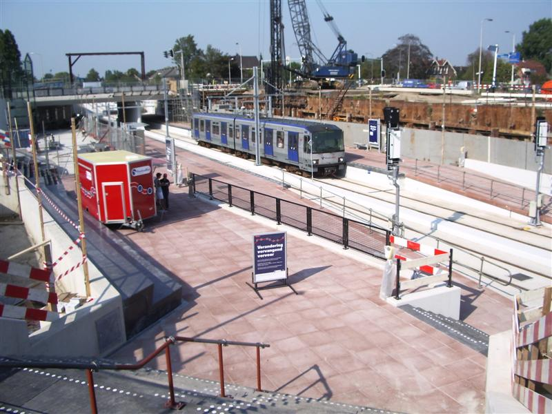 Het vernieuwde station Pijnacker Centrum aan de Hofpleinlijn (RandstadRail).